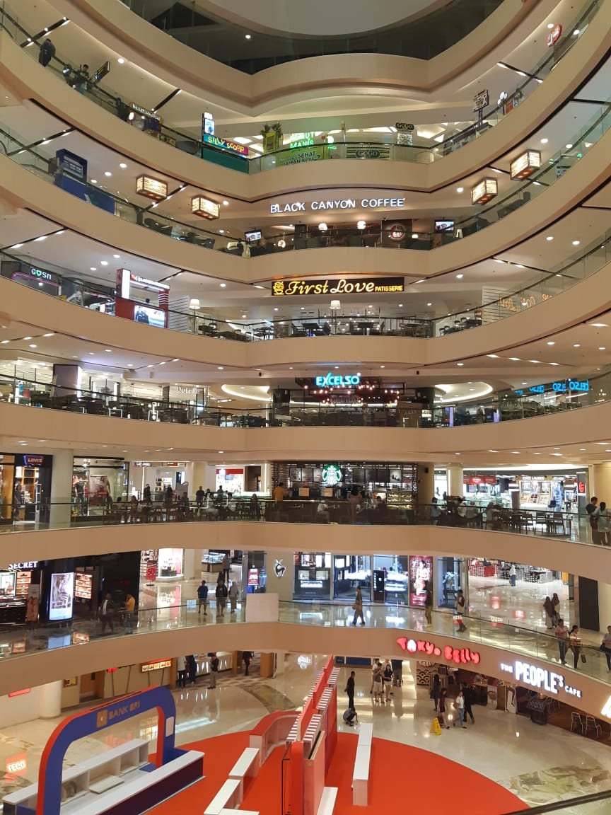 Tunjungan Plaza 3 di Surabaya